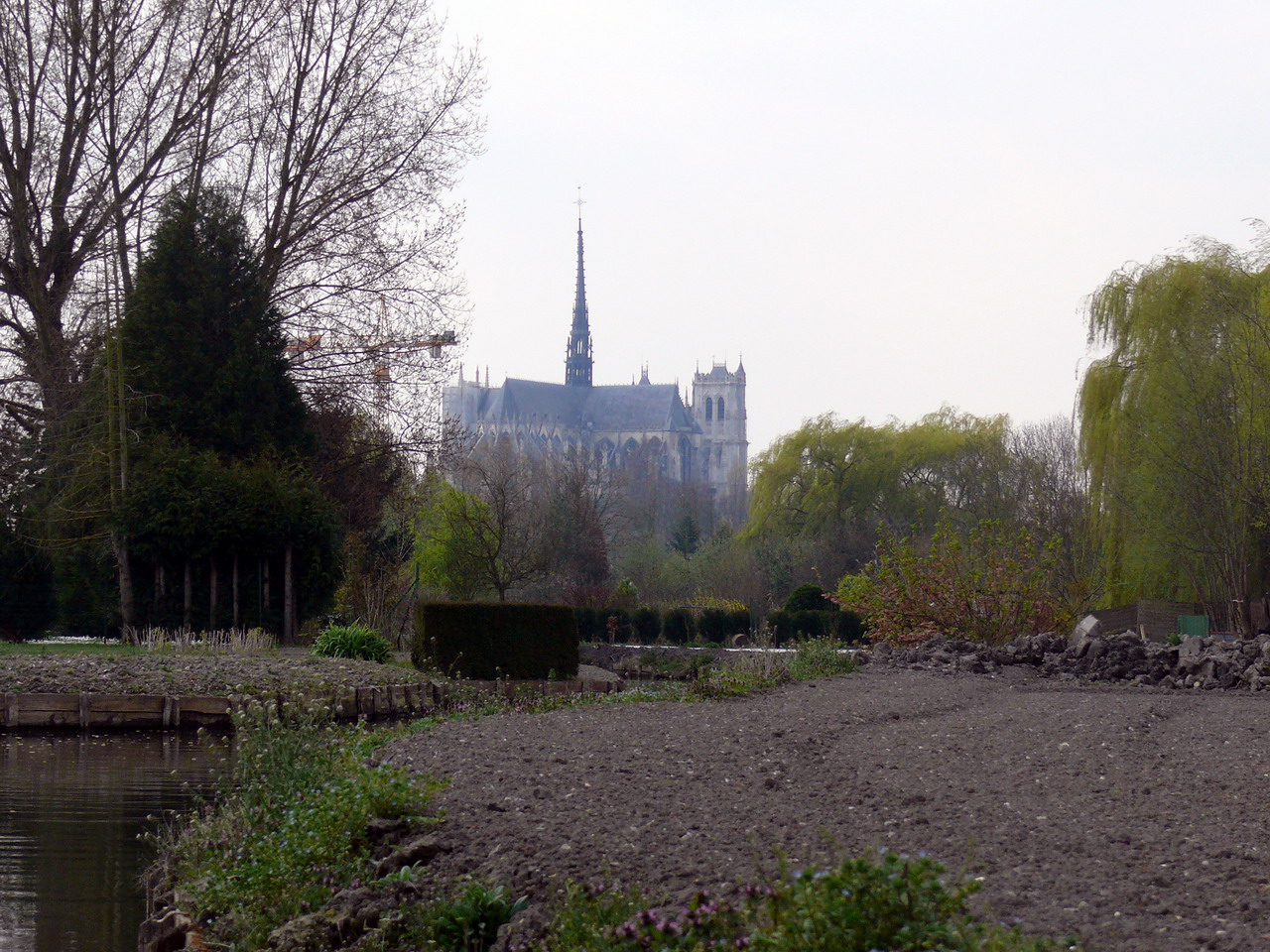 Les Hortillonnages d'Amiens. Au fond, la Cathédrale Notre-Dame d'Amiens